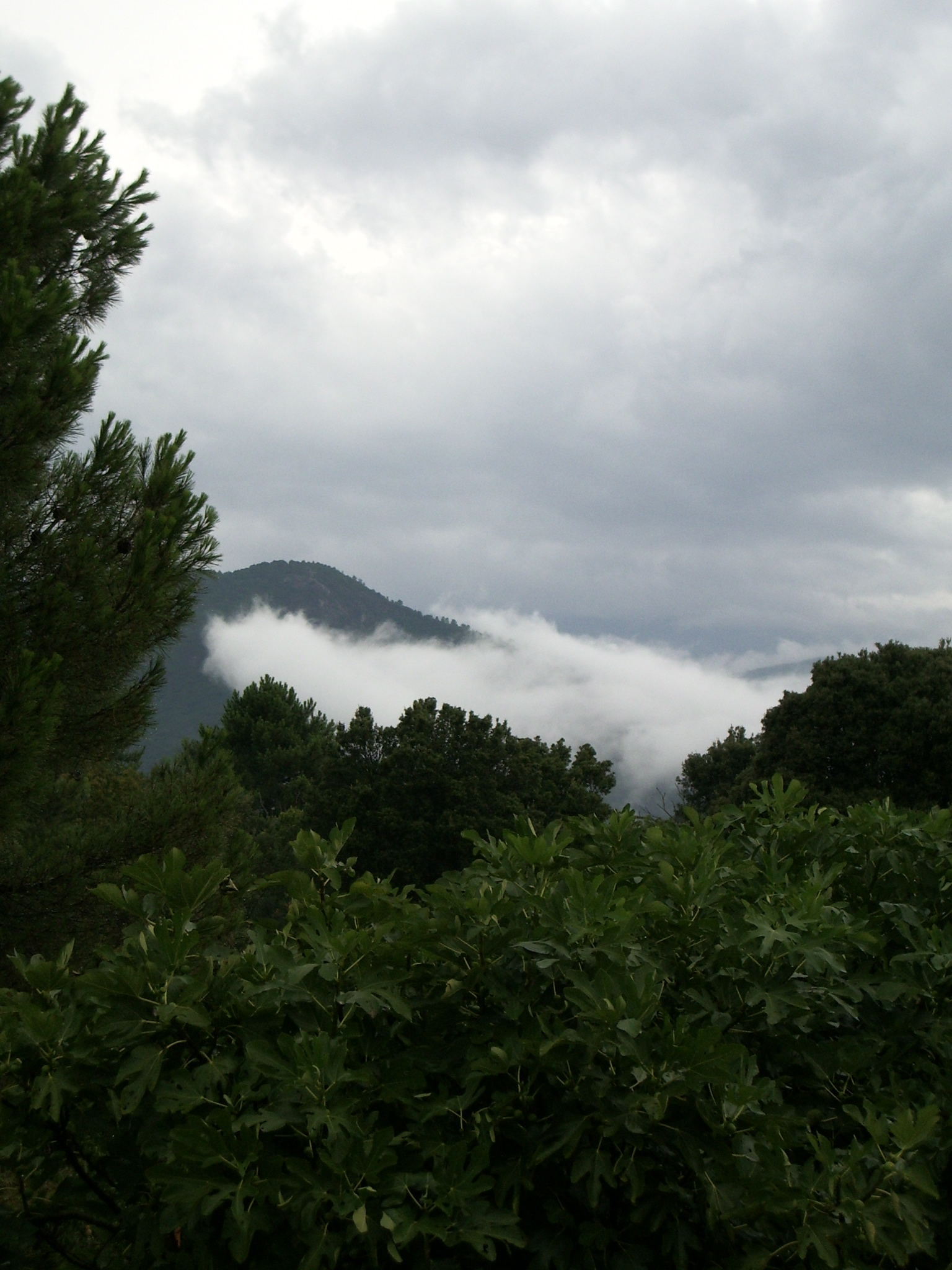 Nuages entre Carbini et Orone (Corse-du-Sud, France)